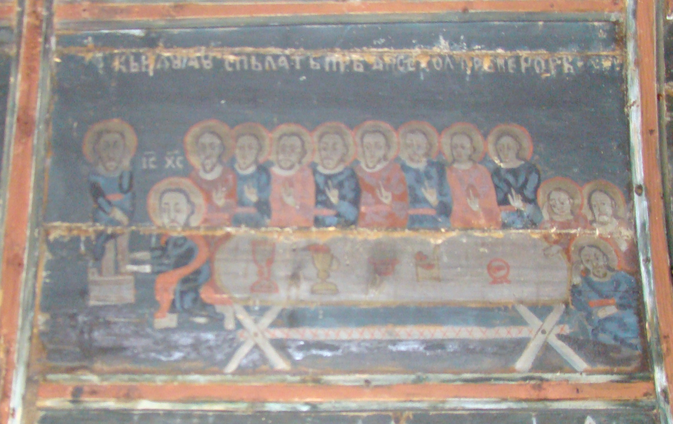 Biserica de lemn din Surduc, județul Bihor